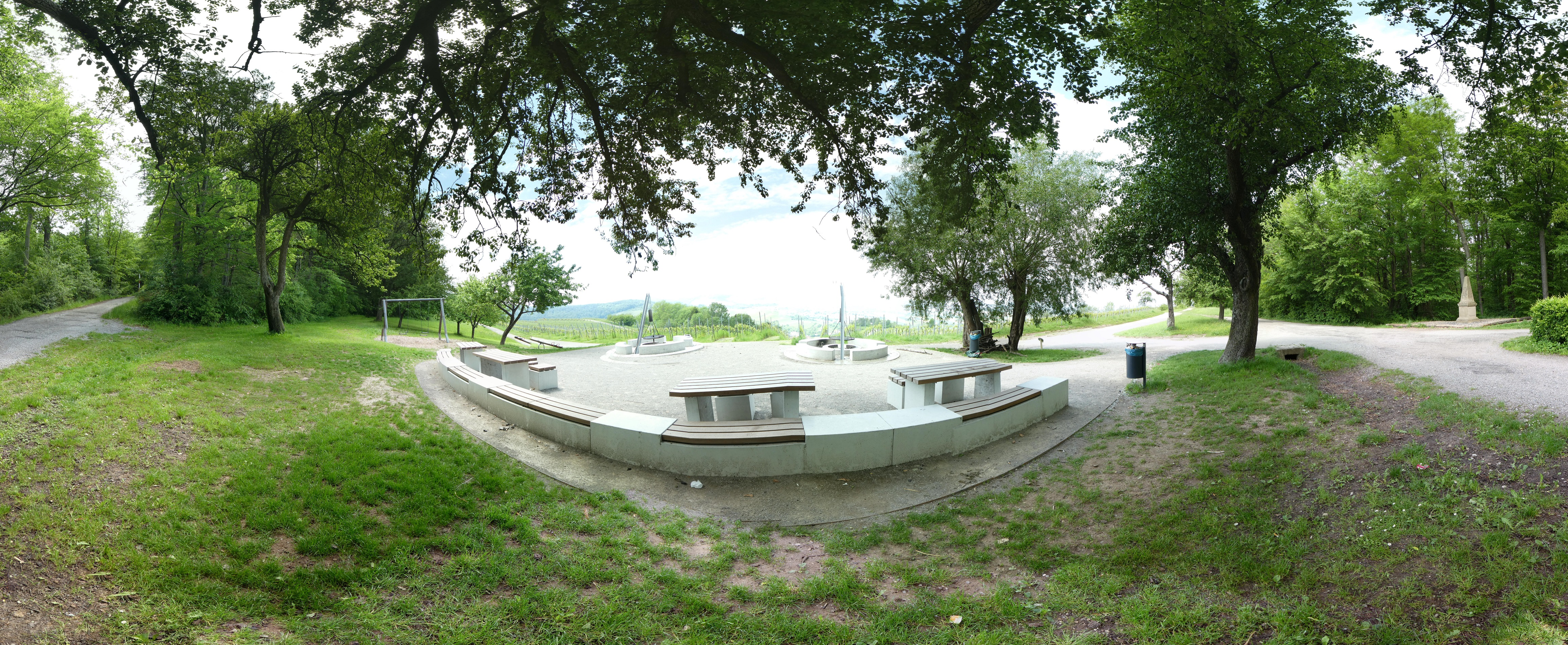 Die im Rahmen der Remstalgartenschau neu gestaltete Grillstelle.